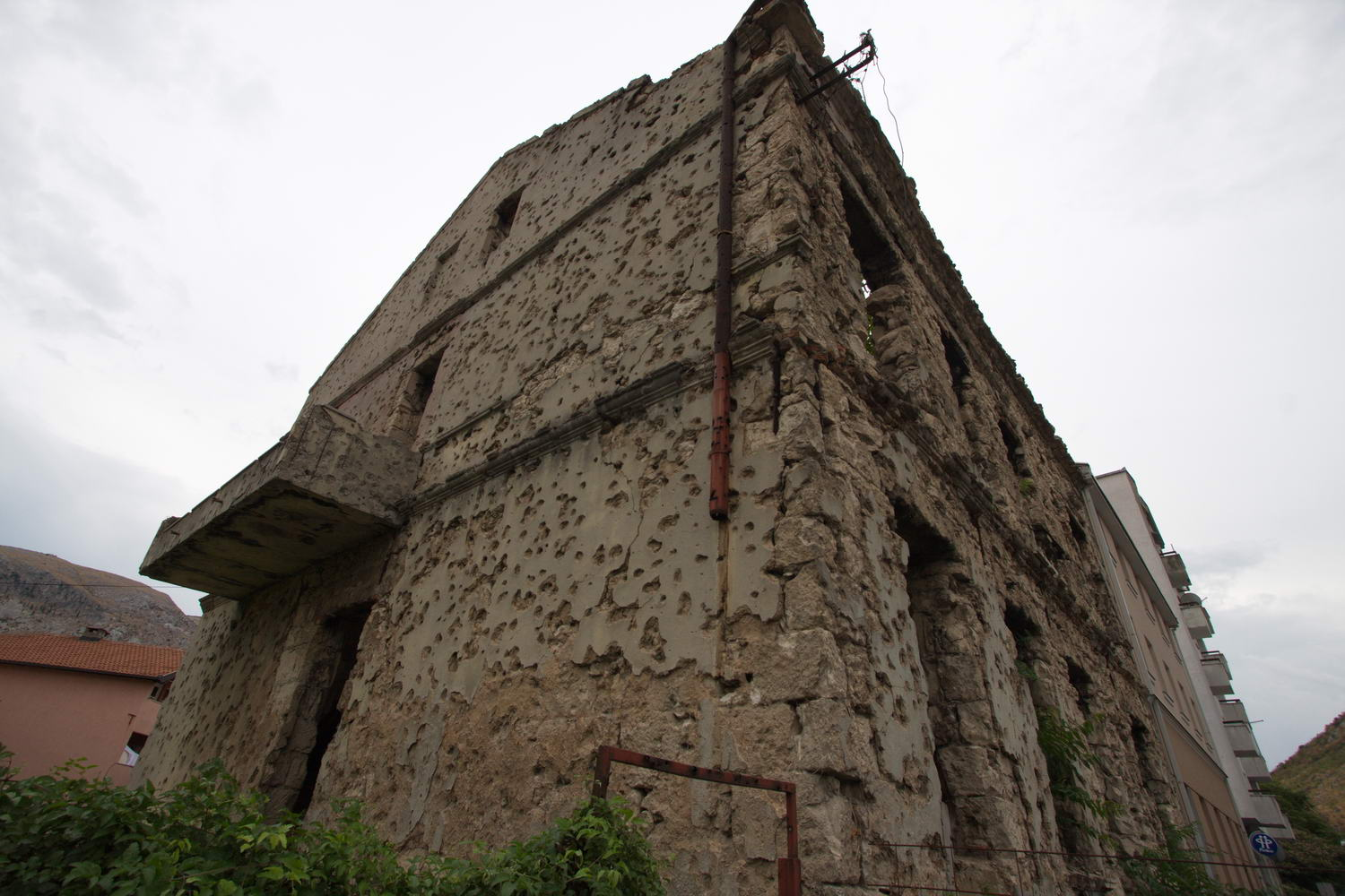 Разрушенный в результате обстрела дом в Мостаре